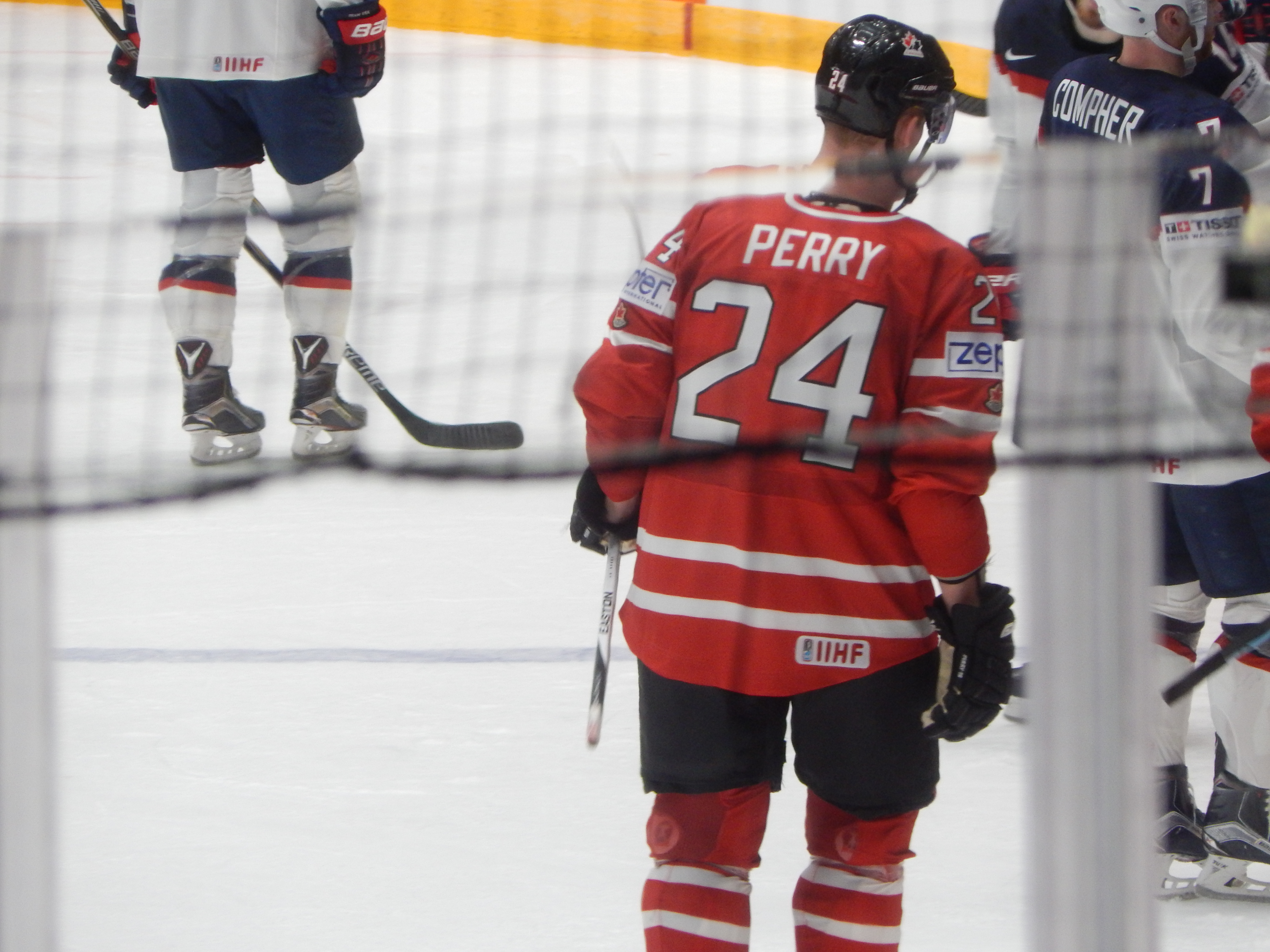 Двухкратный Олимпийский чемпион Кори Перри во время матча-открытия чемпионата мира по хоккею 2016